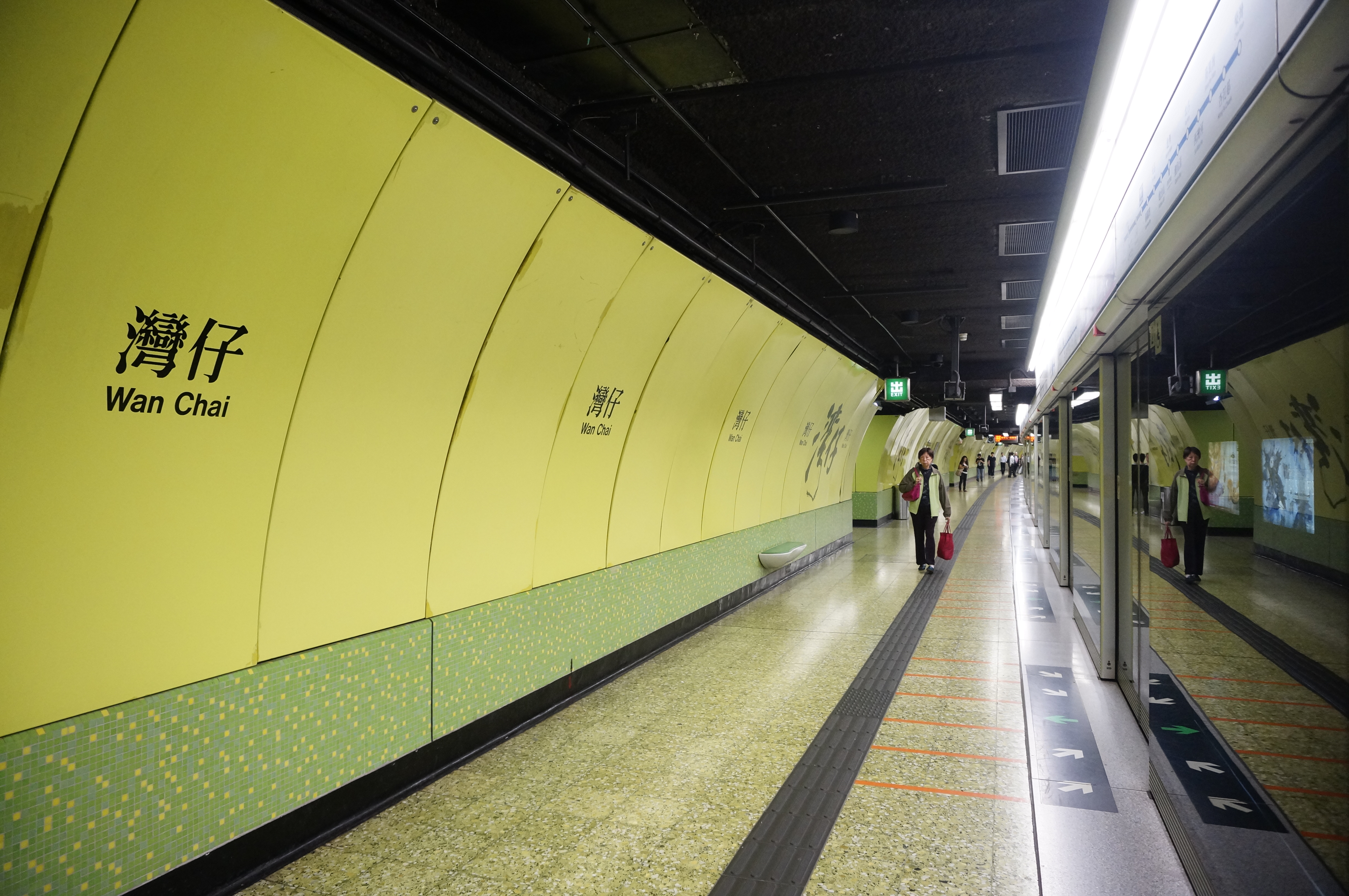 港鐵灣仔站月台